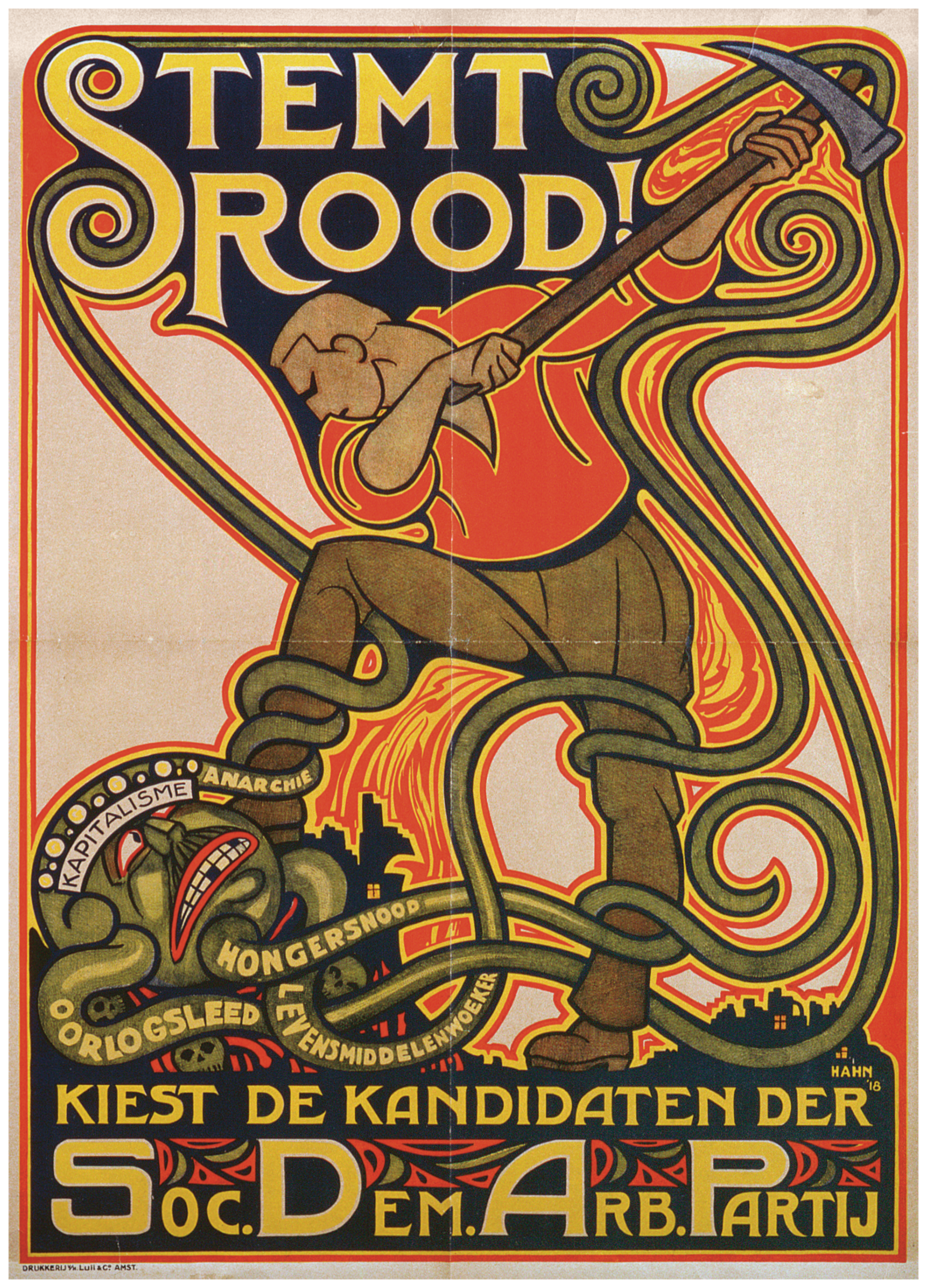 Affiche: Landelijke verkiezingen, SDAP, 1918